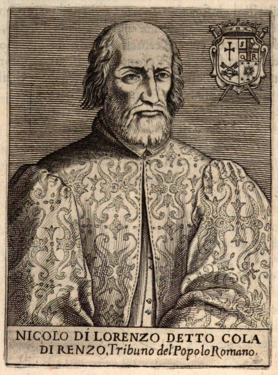 Ritratto di Cola di Rienzo, tribuno del popolo romano